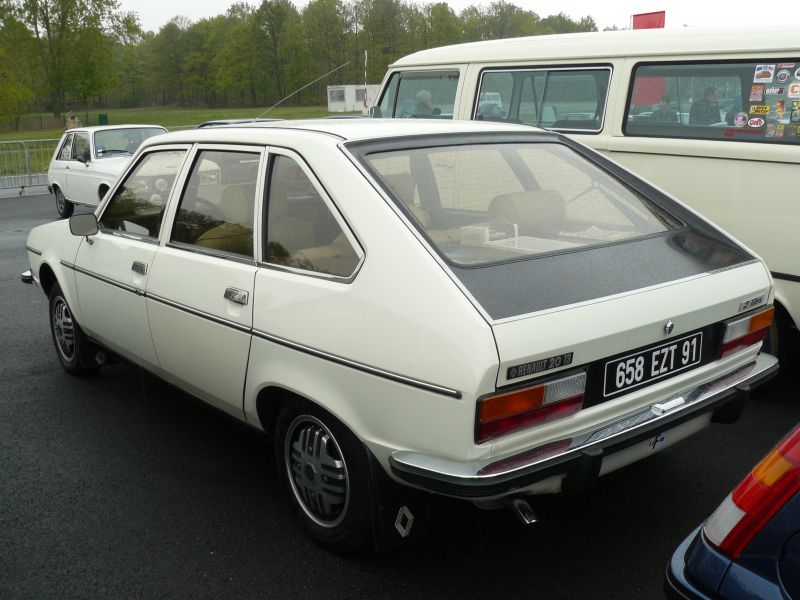 Français cadien: Montlhery avril 2012